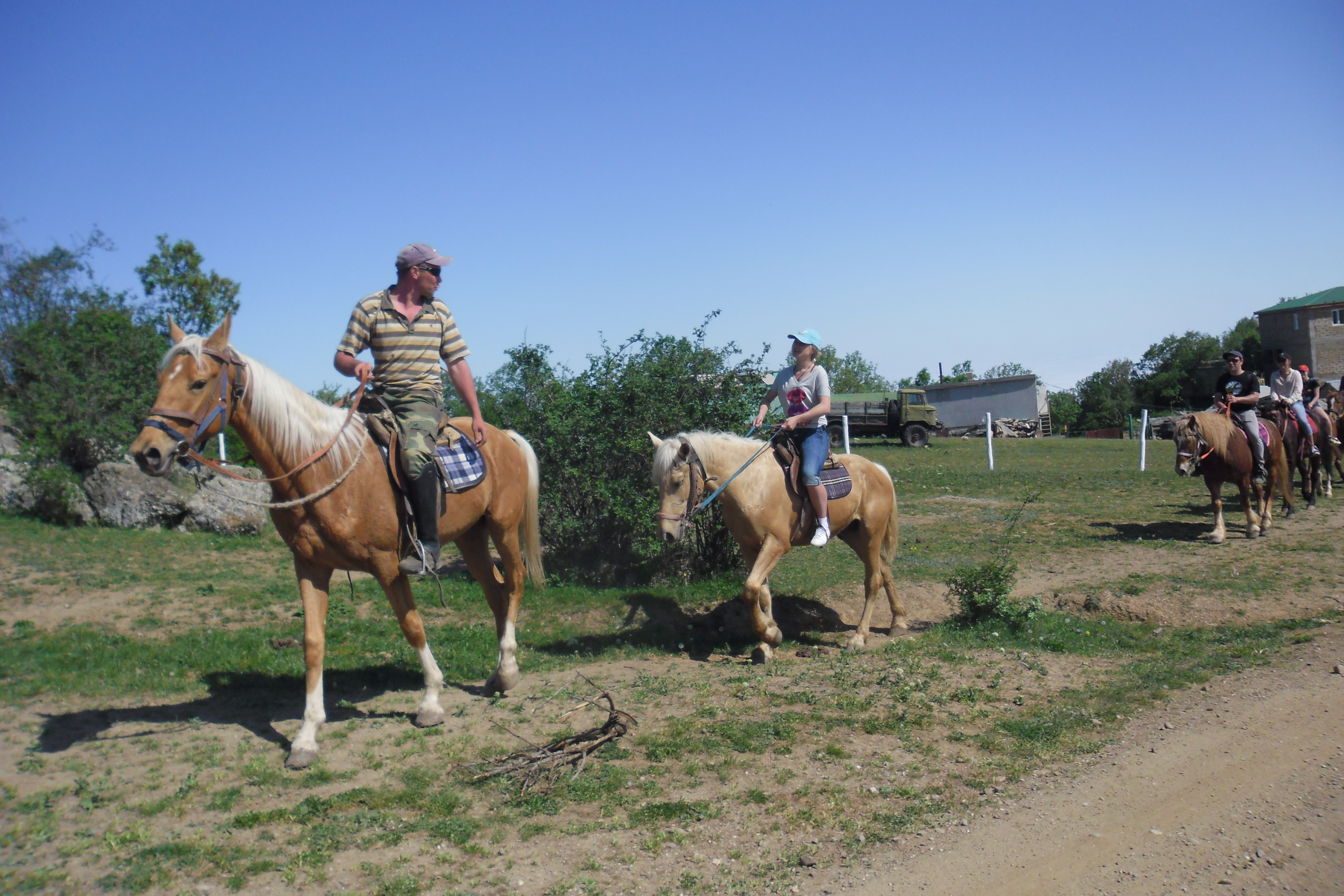 Фото